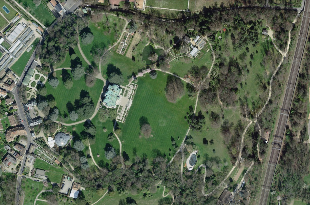 Photo satellite, de Swisstopo, du Château de Pregny, à Pregny-Chambésy (GE), en Suisse.